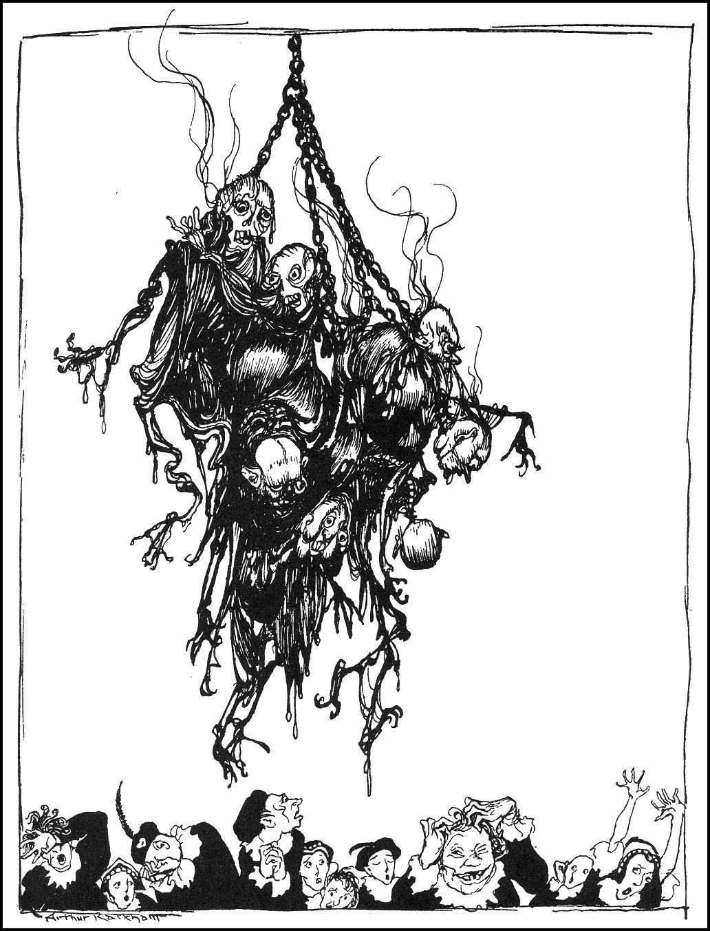 Иллюстрация Артура Рэкхема из книги "Poe's Tales of Mystery and Imagination" к рассказу Эдгара По "Прыг-Скок"